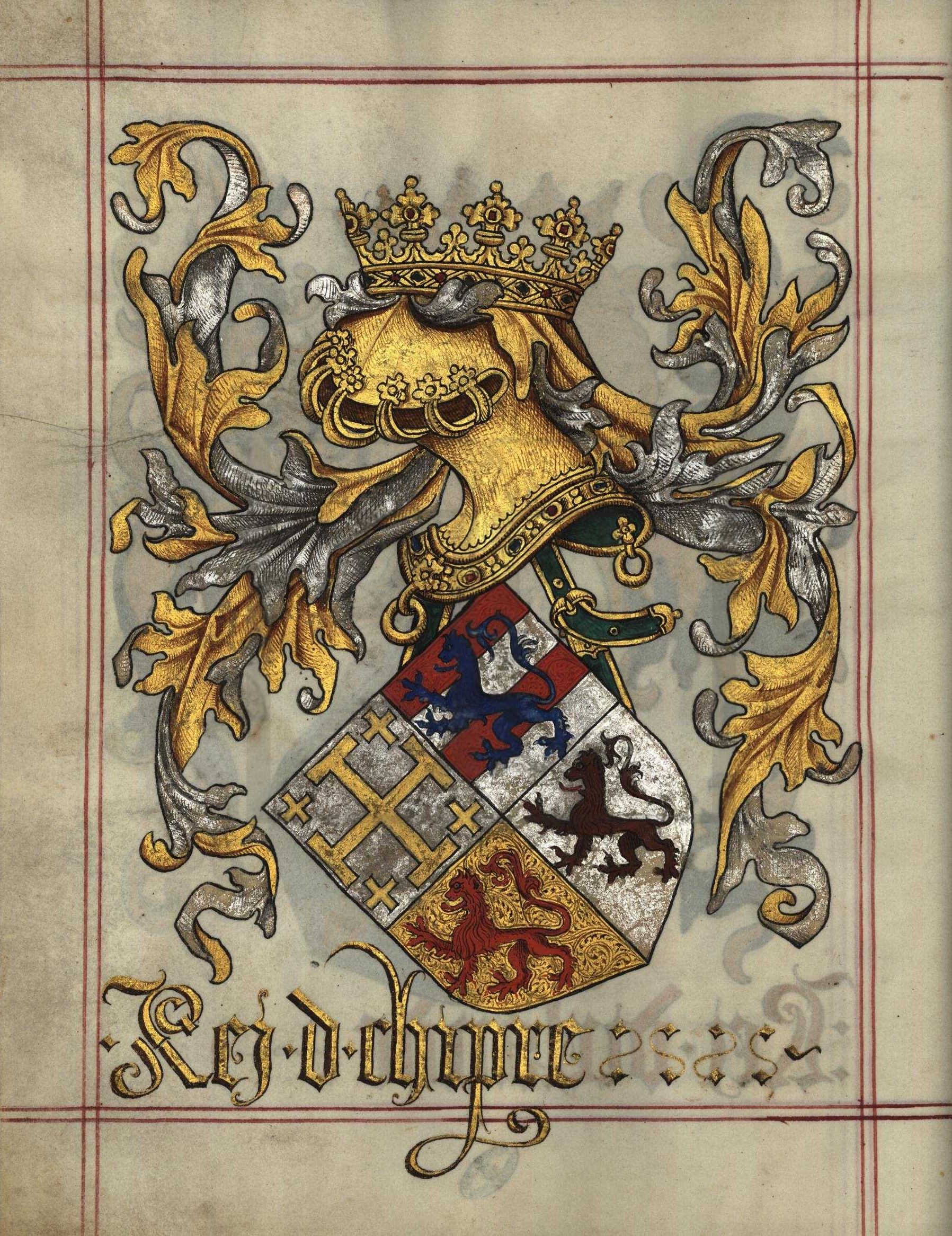 Livro do Armeiro-Mor (1509), Armas do Rei de Chipre (fl 16v)